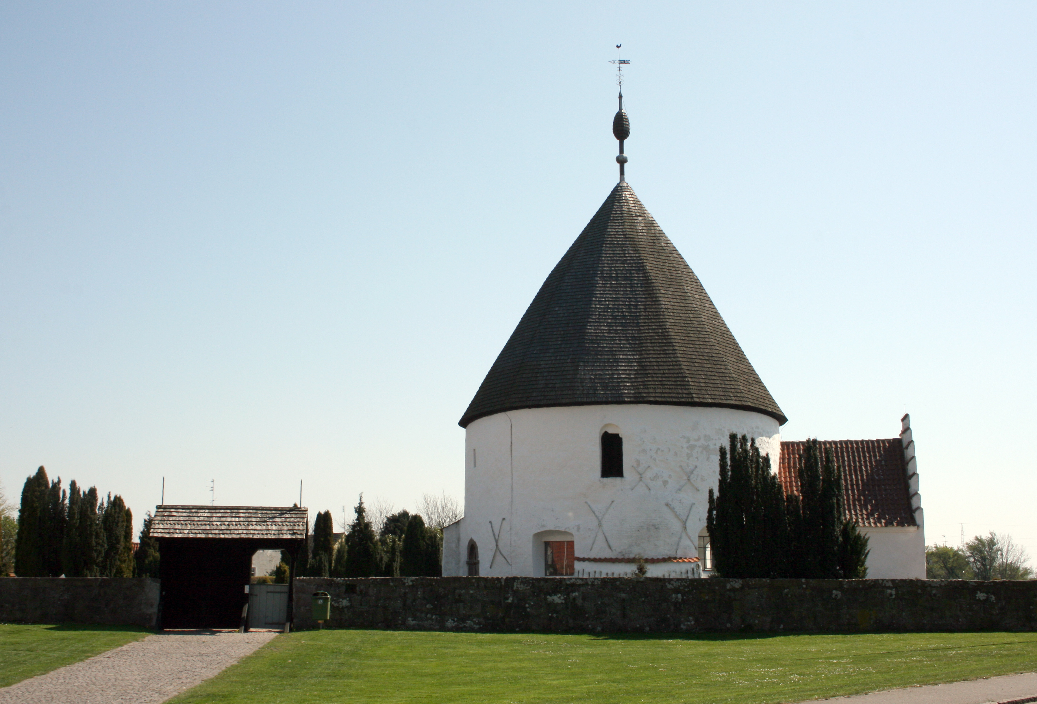 Ny Kirke fra vest